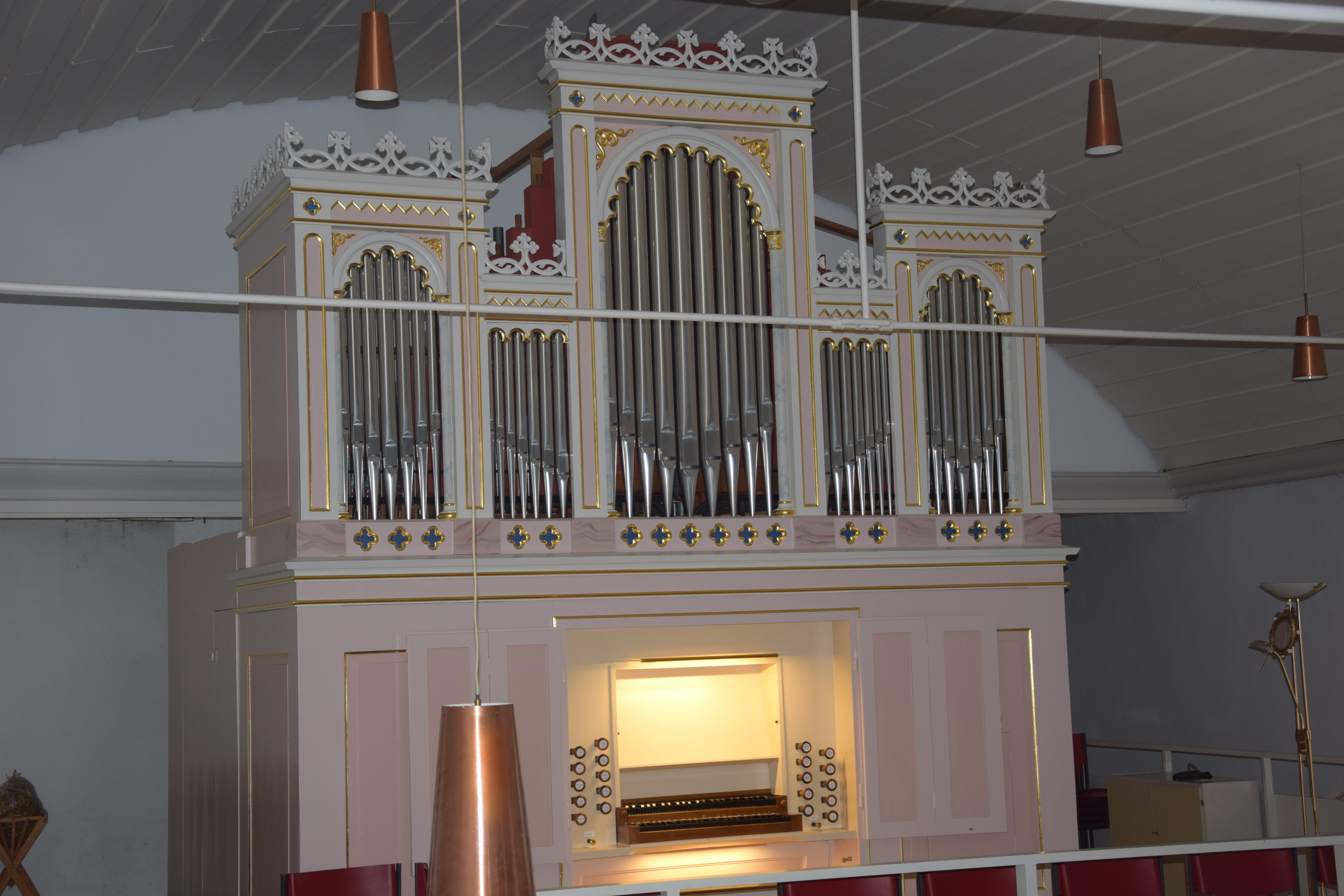 Das Prospekt der 1857 erbauten Engelhardt-Orgel der St. Michaeliskirche Schwiegershausen